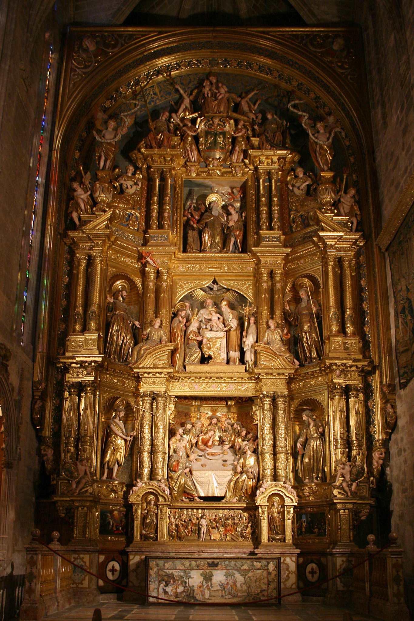 Catedral de Santa María de Palma de Mallorca